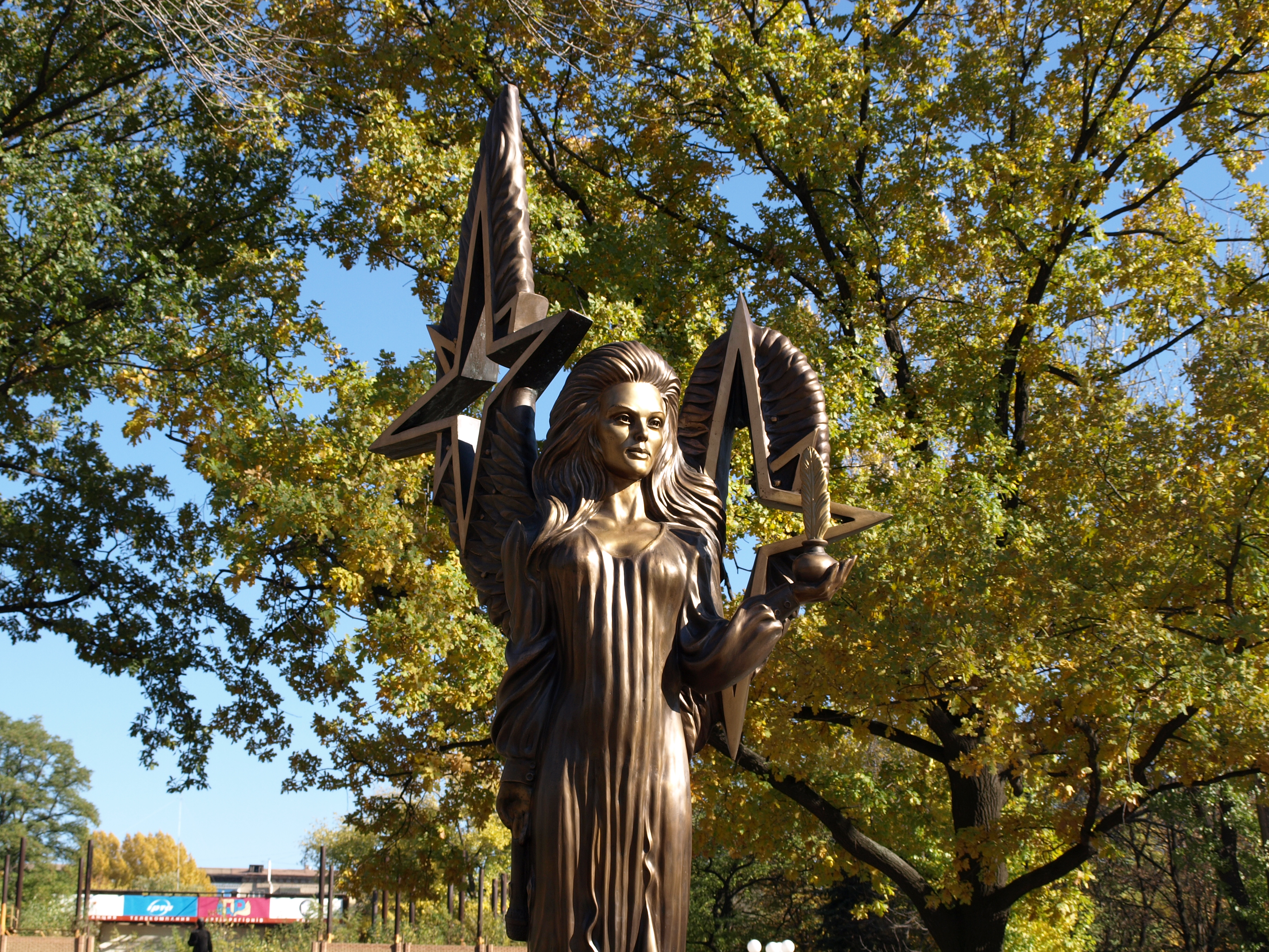 Монумент на сквере в Луганске.